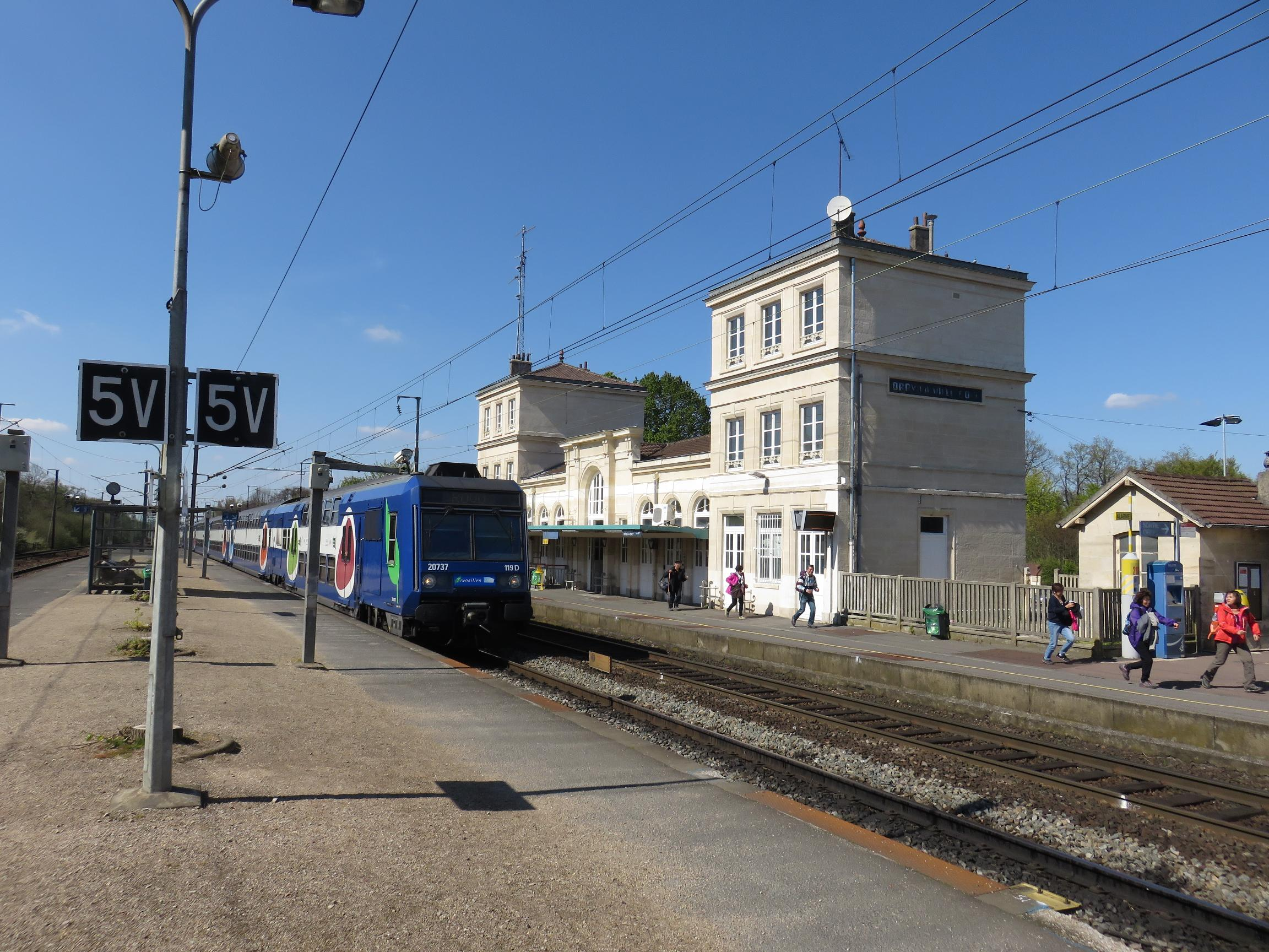 La gare d'Orry la Ville - Coye